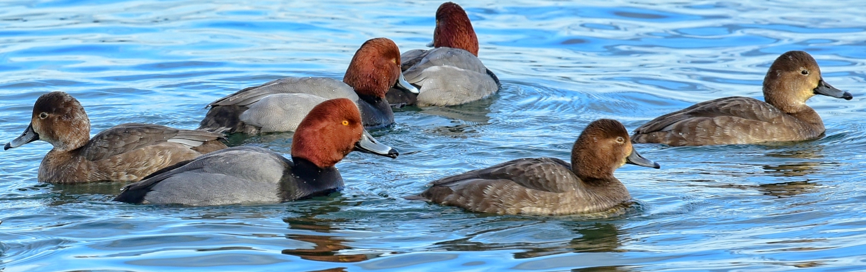 Група качок Aythya americana в Торонто на озері Онтаріо